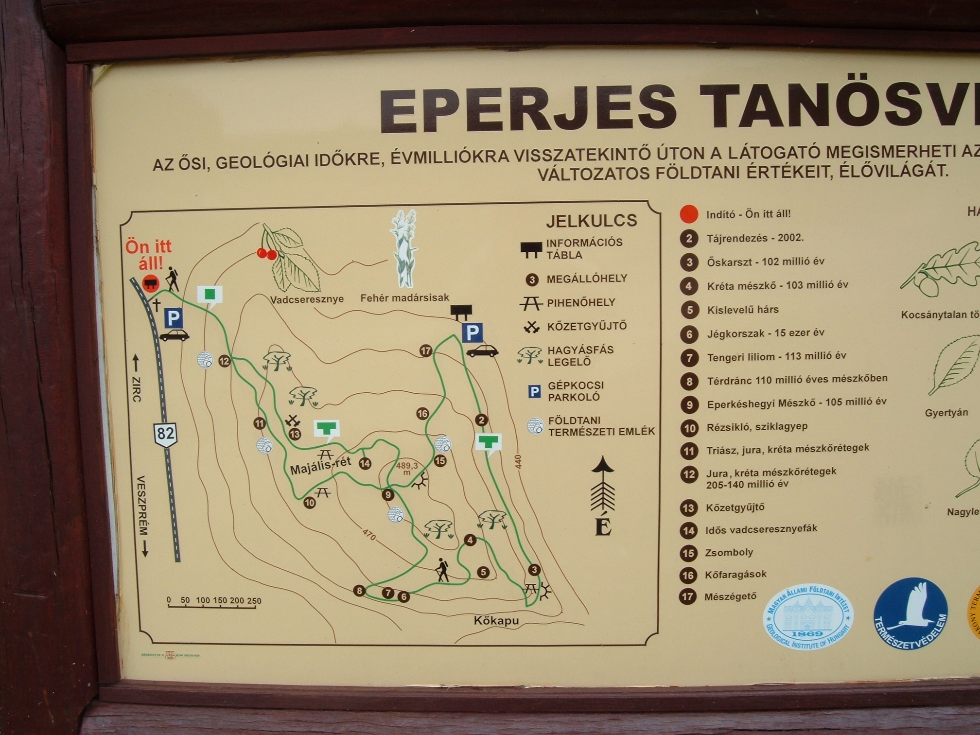 Az Eperjes tanösvény tájékoztató táblája (Olaszfalu)